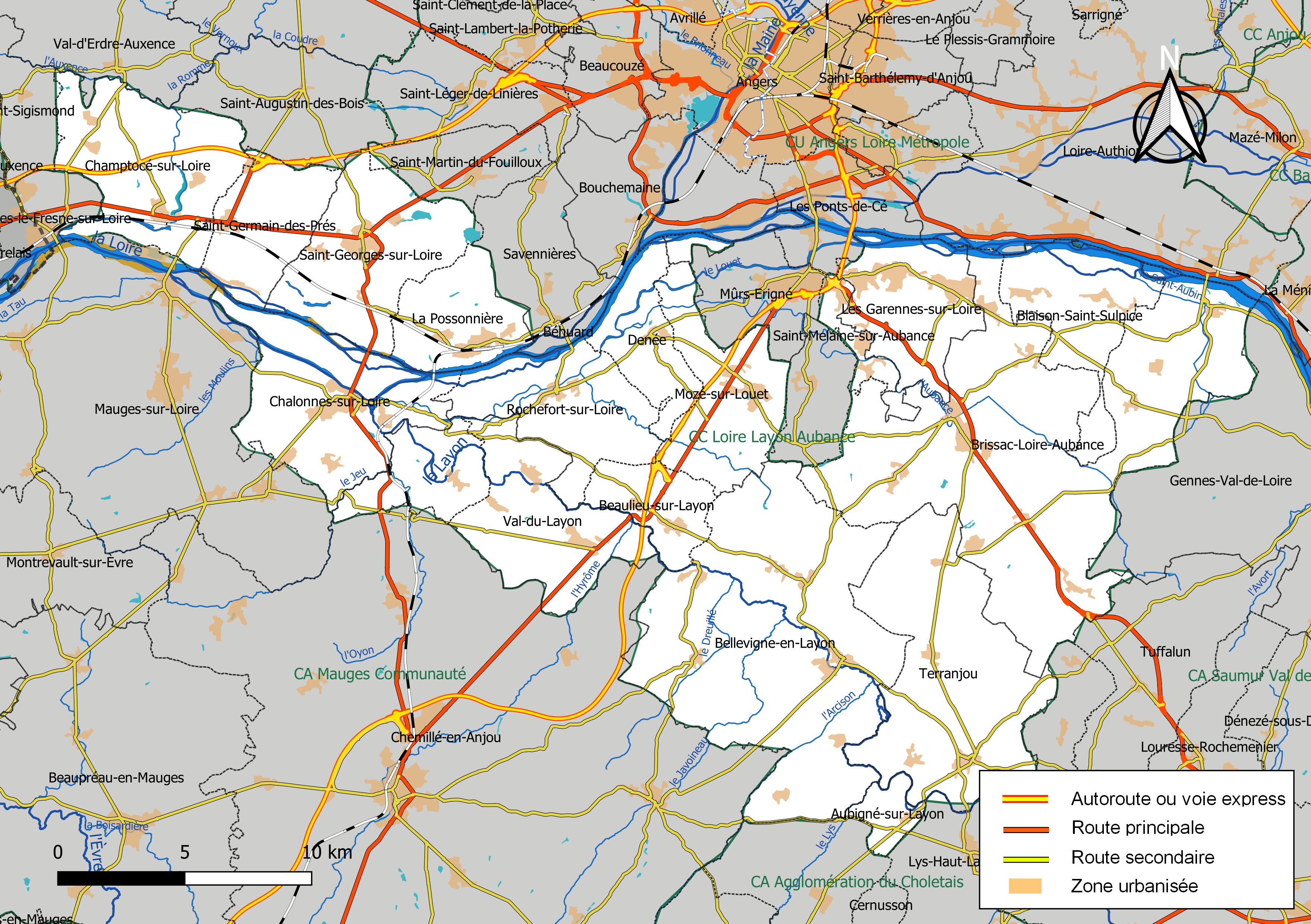 Carte géographique de la Communauté de communes Loire Layon Aubance, département de Maine-et-Loire, France. Composition au 1er janvier 2019.